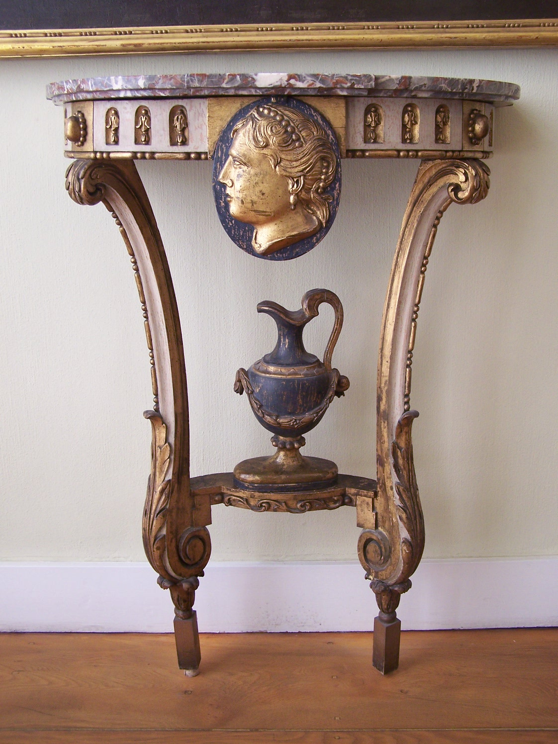 Couven Museum – Directoire-Zimmer. Konsoltisch.